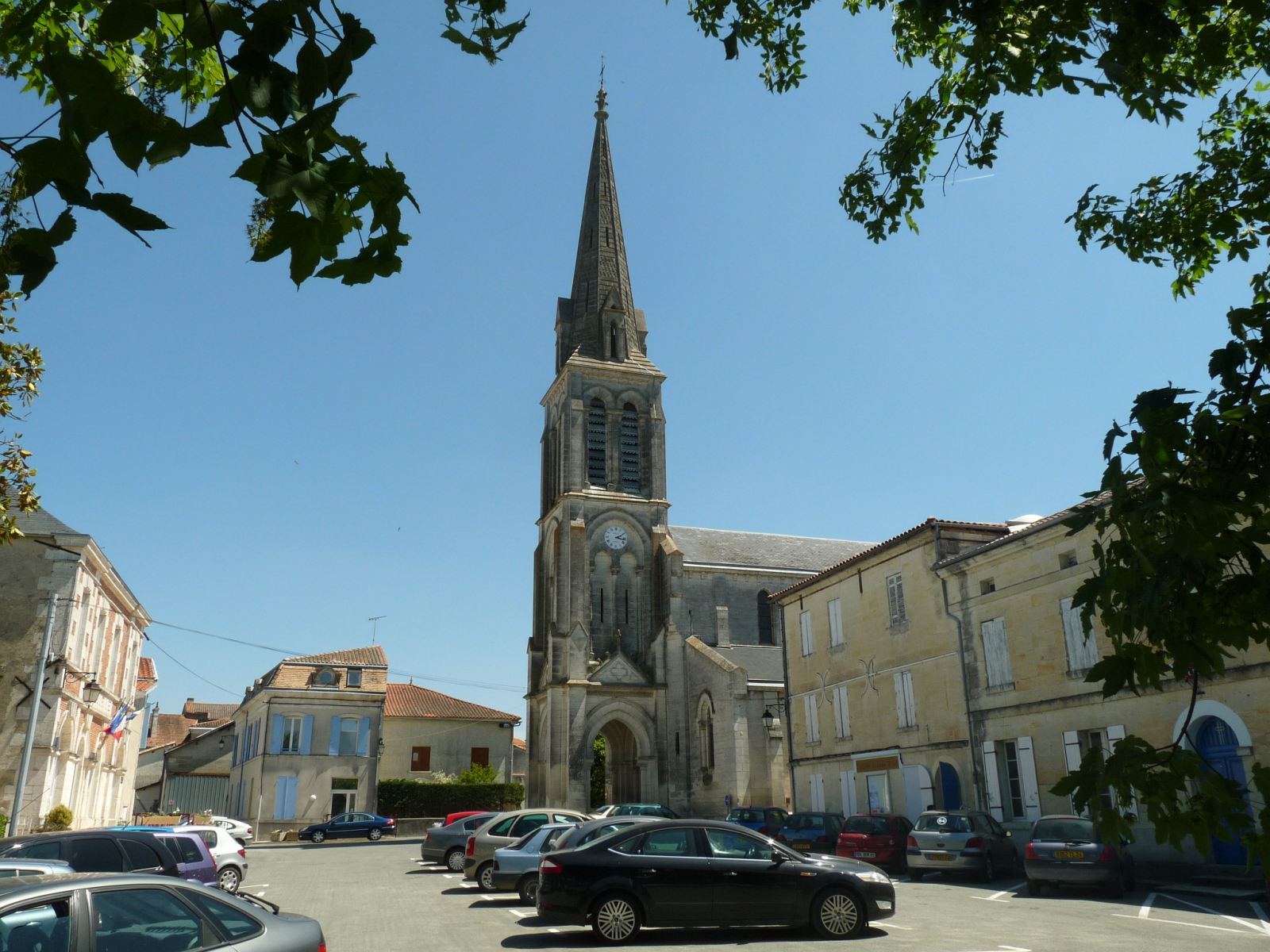 église de La Roche-Chalais, Dordogne, France